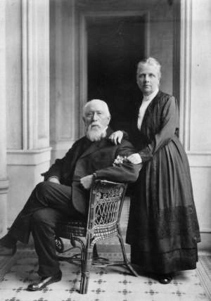 Adam e Ana Von Bülow